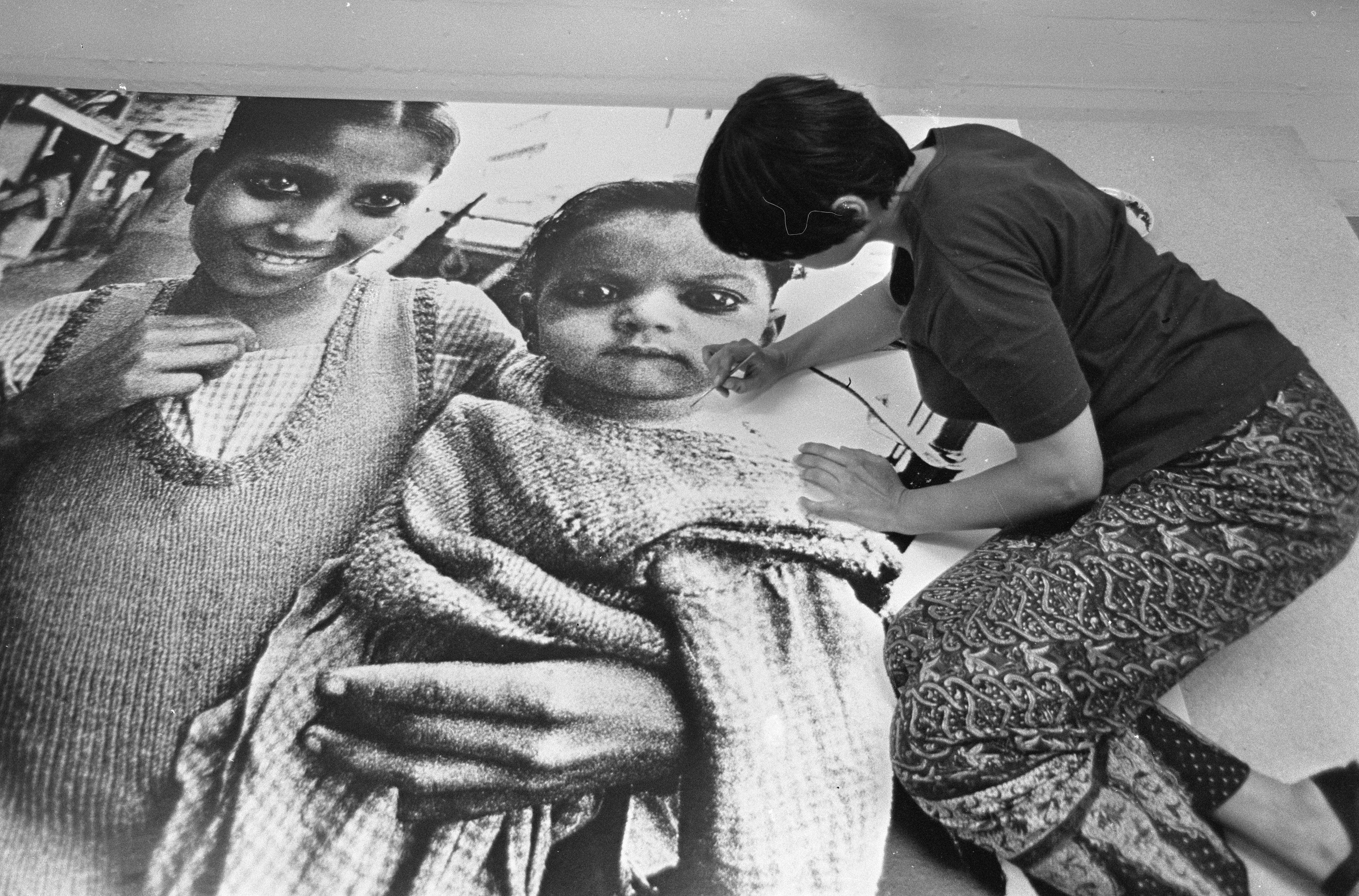 Tentoonstelling "Hee ... zie je dat?" van Ed van der Elsken in het Stedelijk Museum te Amsterdam. Echtgenote Gerda van der Veen retoucheert.